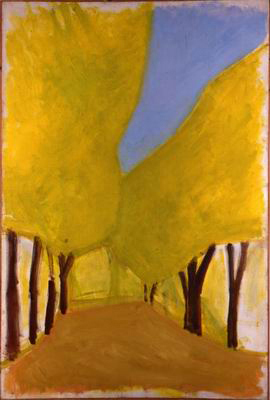 Painting